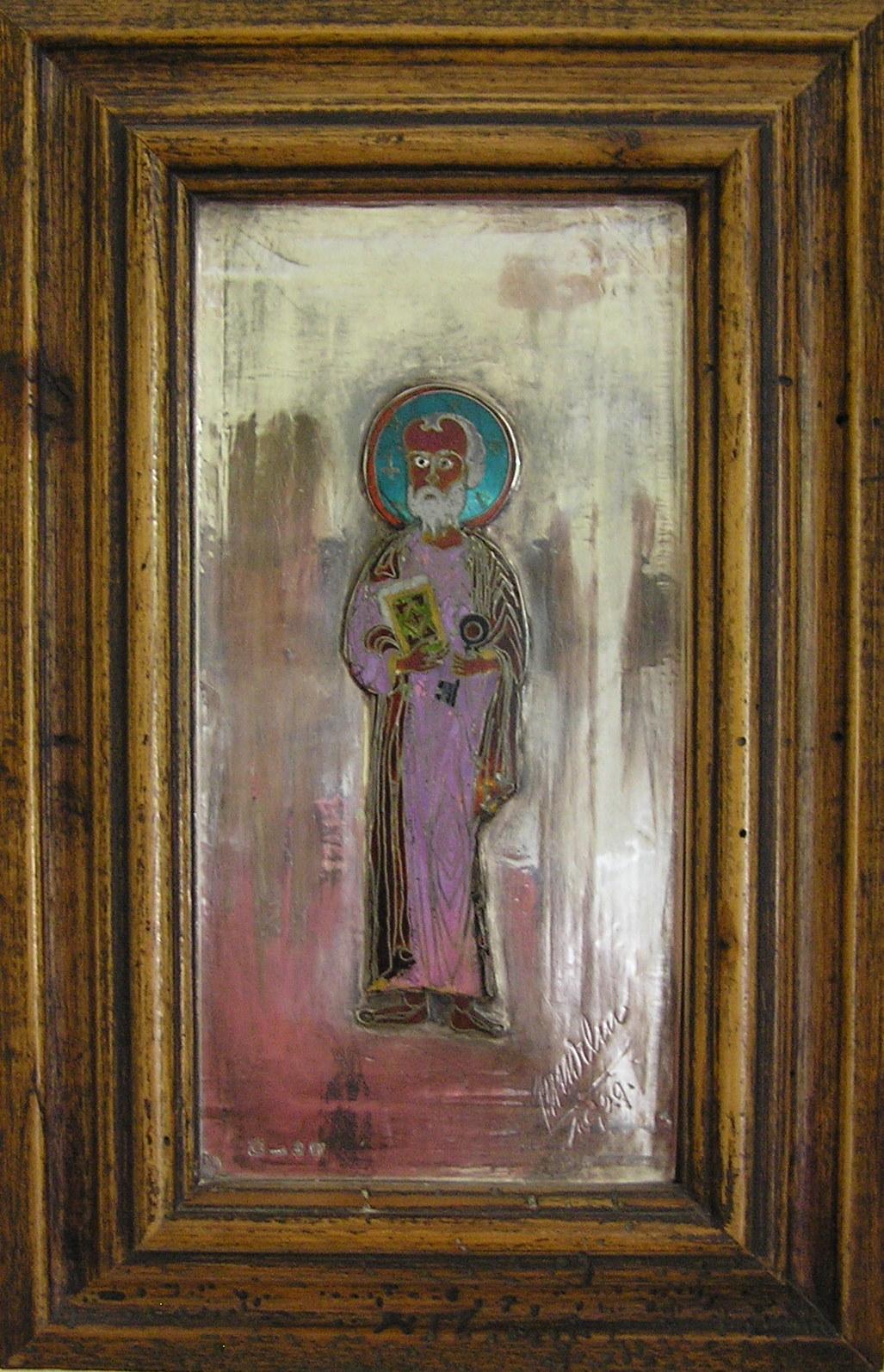 Joh. Michael Wilm - Hlg. Petrus, Zellenschmelzemail auf Silber, 1929